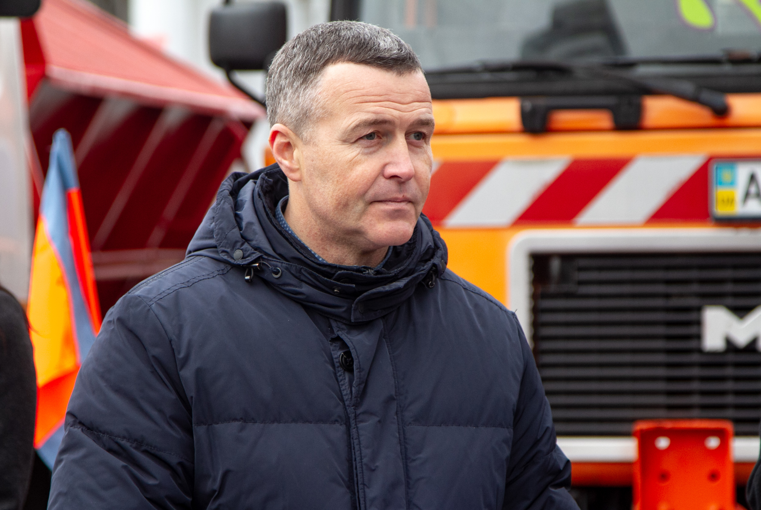 Выставка «Киевавтодора». Густелев Александр Александрович